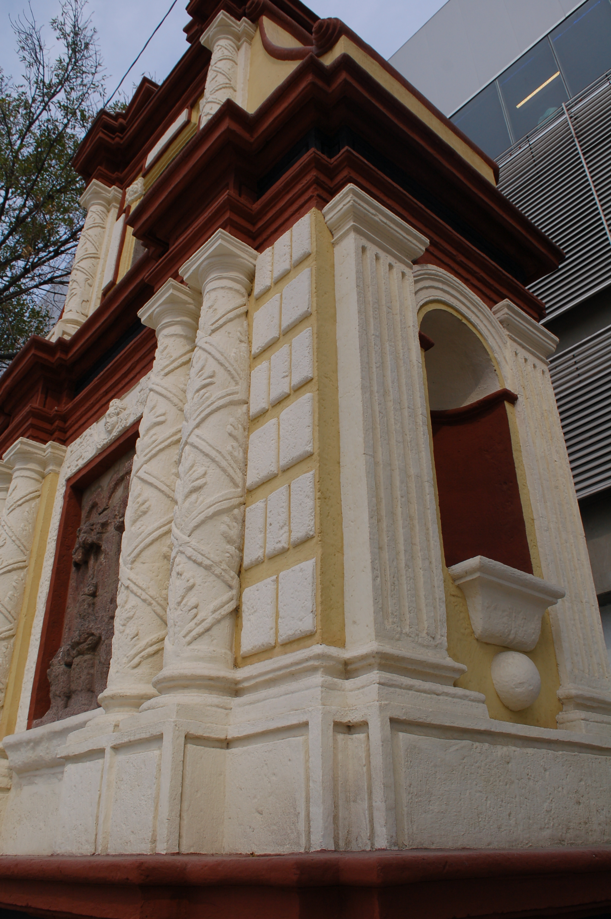 Vista lateral del Misterio La Purificación de Nuestra Señora